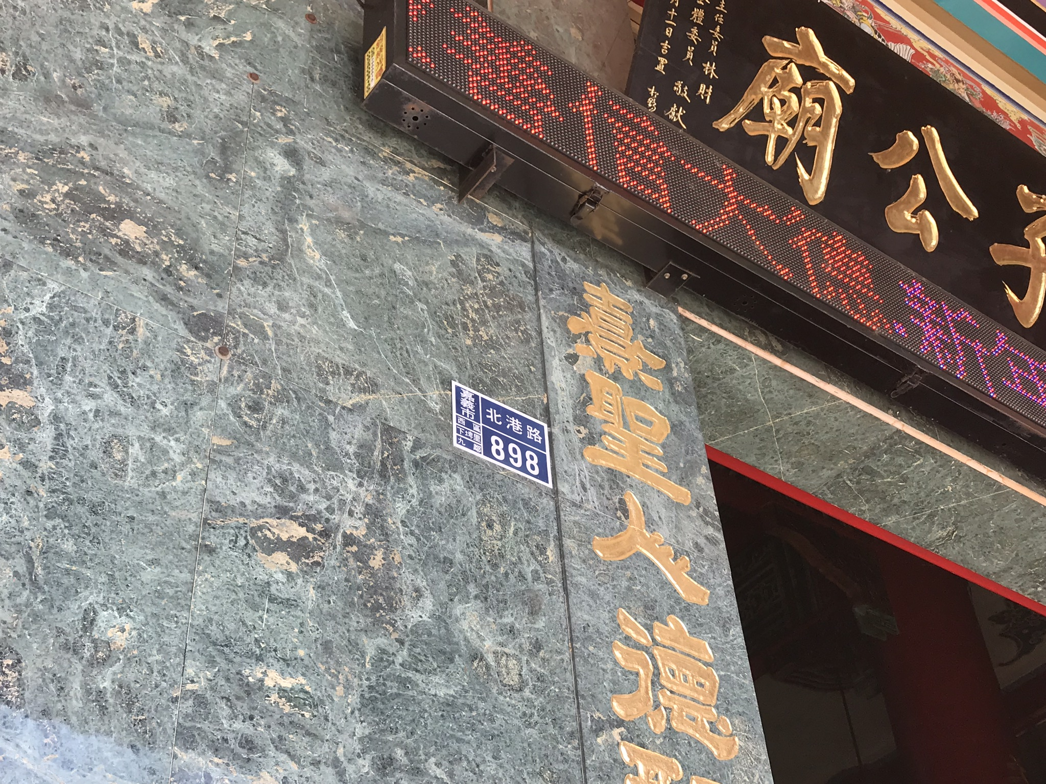 中文（台灣）: 朱子公廟門牌